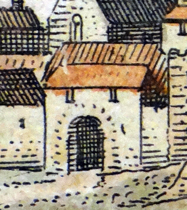 Goldene Pforte, Worms. Detail aus: Matthäus Merian: Topographia Palatinus Rheni et Vicinarum Regionum. Hoffmann, Frankfurt 1645, Tafel zwischen S. 96 u. 97. Stadtarchiv Worms: Abt. 217 Nr. 1495; Eugen Kranzbühler: Verschwundene Wormser Bauten. Beiträge zur Baugeschichte und Topographie der Stadt. Kräuter’sche Buchhandlung, Worms 1905, Tafel vor S. V.